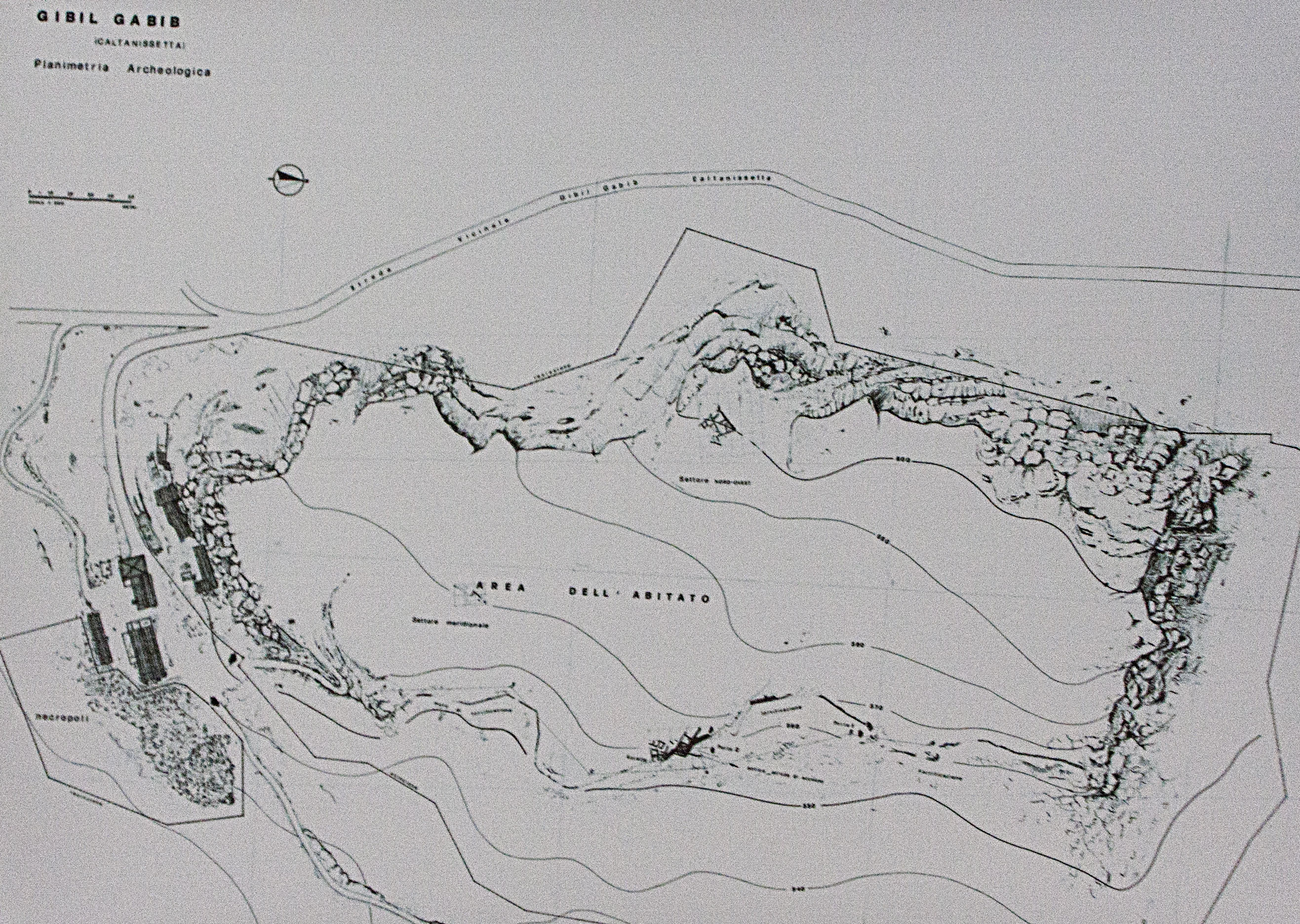 Planimetria di Gibil Gabib